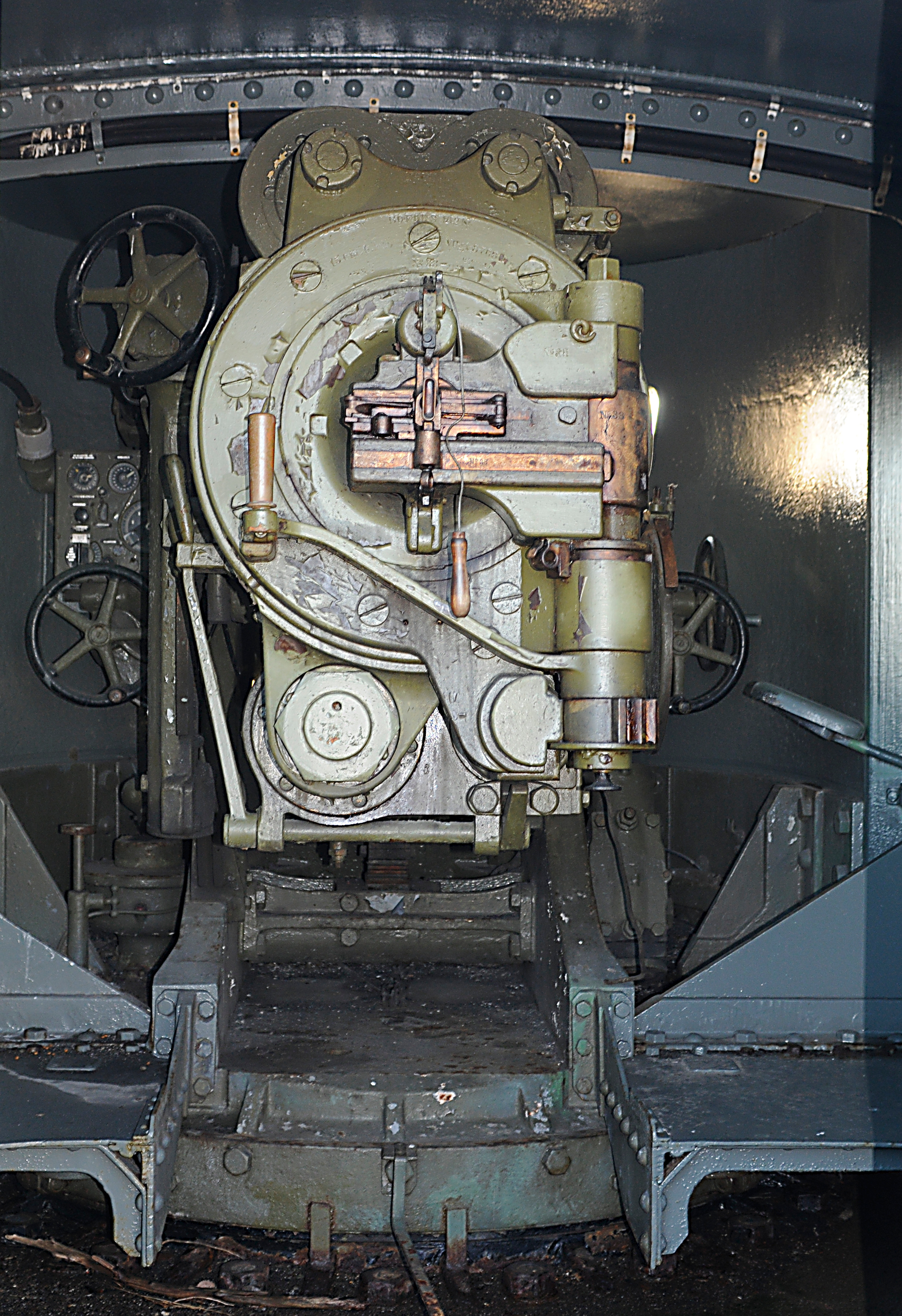 15cm Bofors L/50, Torås fort